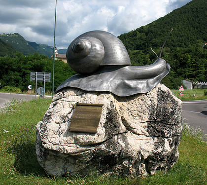 Questa scultura in ferro battuto rappresenta un "bogone", animale legato alla storia del paese, ed è situata alle porte di Sant'Andrea.